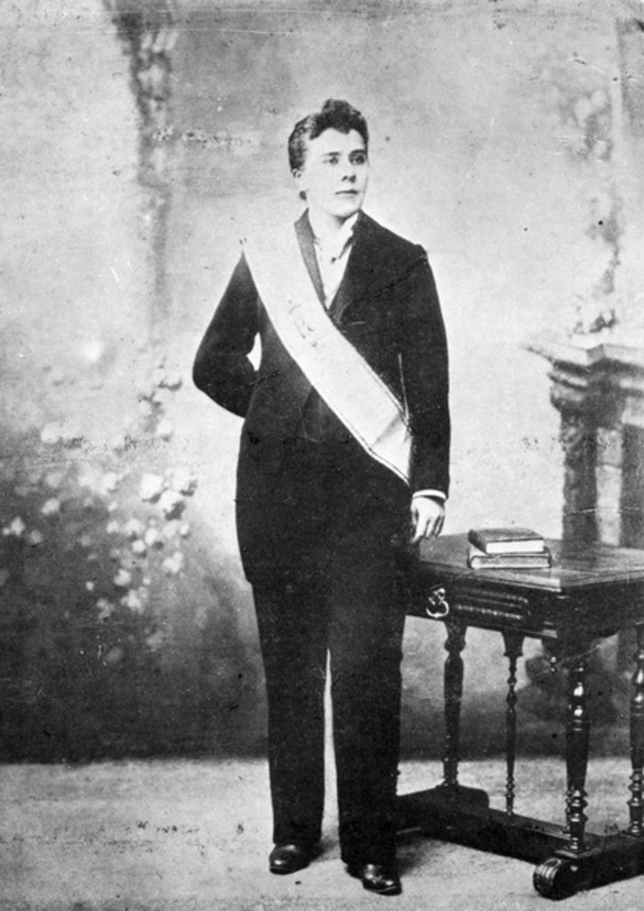 La prétendue « Diana Vaughan », en tenue d’« Inspectrice Générale du Palladium ». Photographie de Van Bosch, publiée dans l'ouvrage Mémoires d'une ex-palladiste parfaite, initiée, indépendante, Paris, Librairie antimaçonnique A. Pierret, 1895, p. 81.